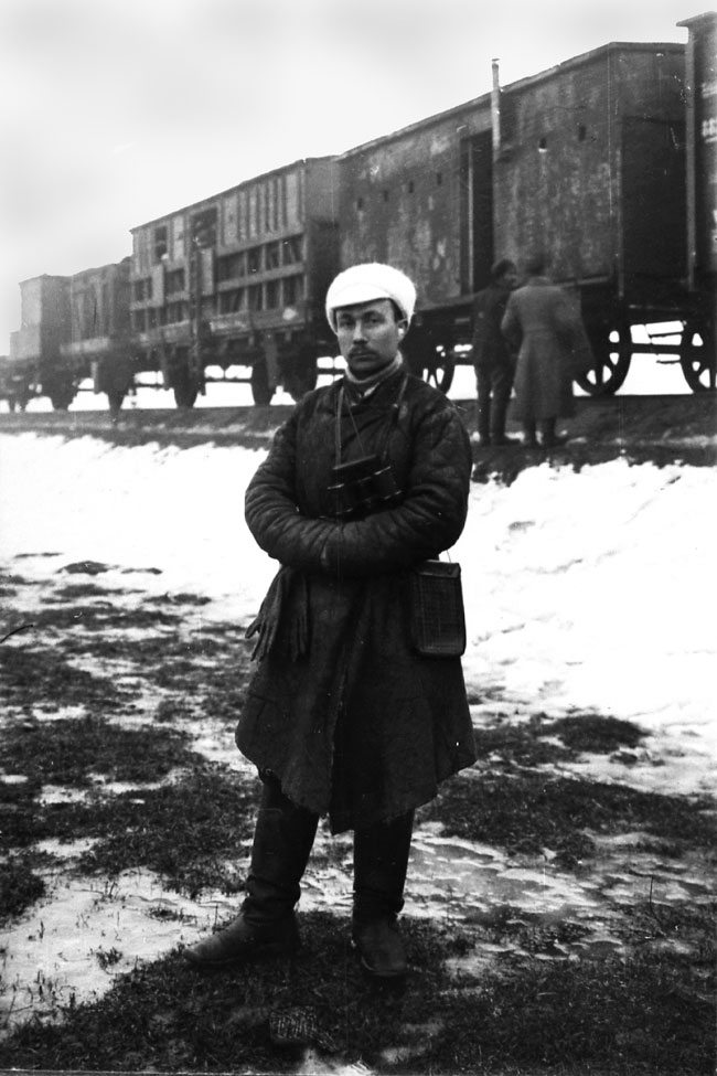 Laiarööpalise soomusrongi nr 1 ülem kapten Anton Irv Aegviidu jaamas oma soomusrongi ees (jaanuar 1919).